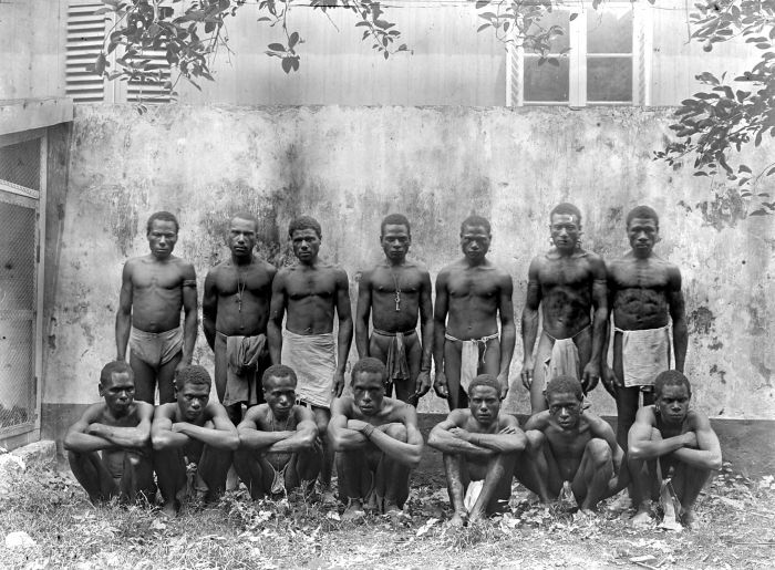 Negatief. Deze foto is gemaakt tijdens de Wichmann Expeditie Noord-Nieuw-Guinea van 1903.. Groepsportret van Papoea mannen van de Von Humboldt Baai in Noord Nieuw Guinea in Ternate